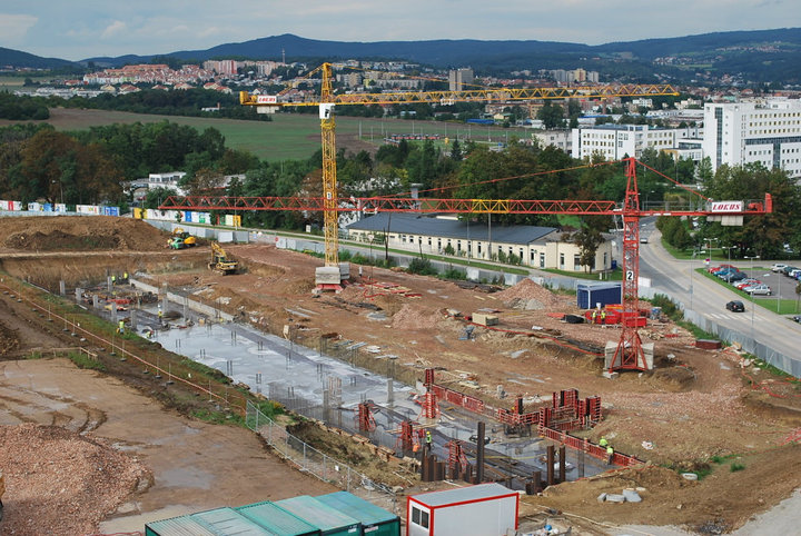 Výstavba budovy Fakulty elektrotechniky a komunikačních technologií Vysokého učení technického v Brně na Technické 12.